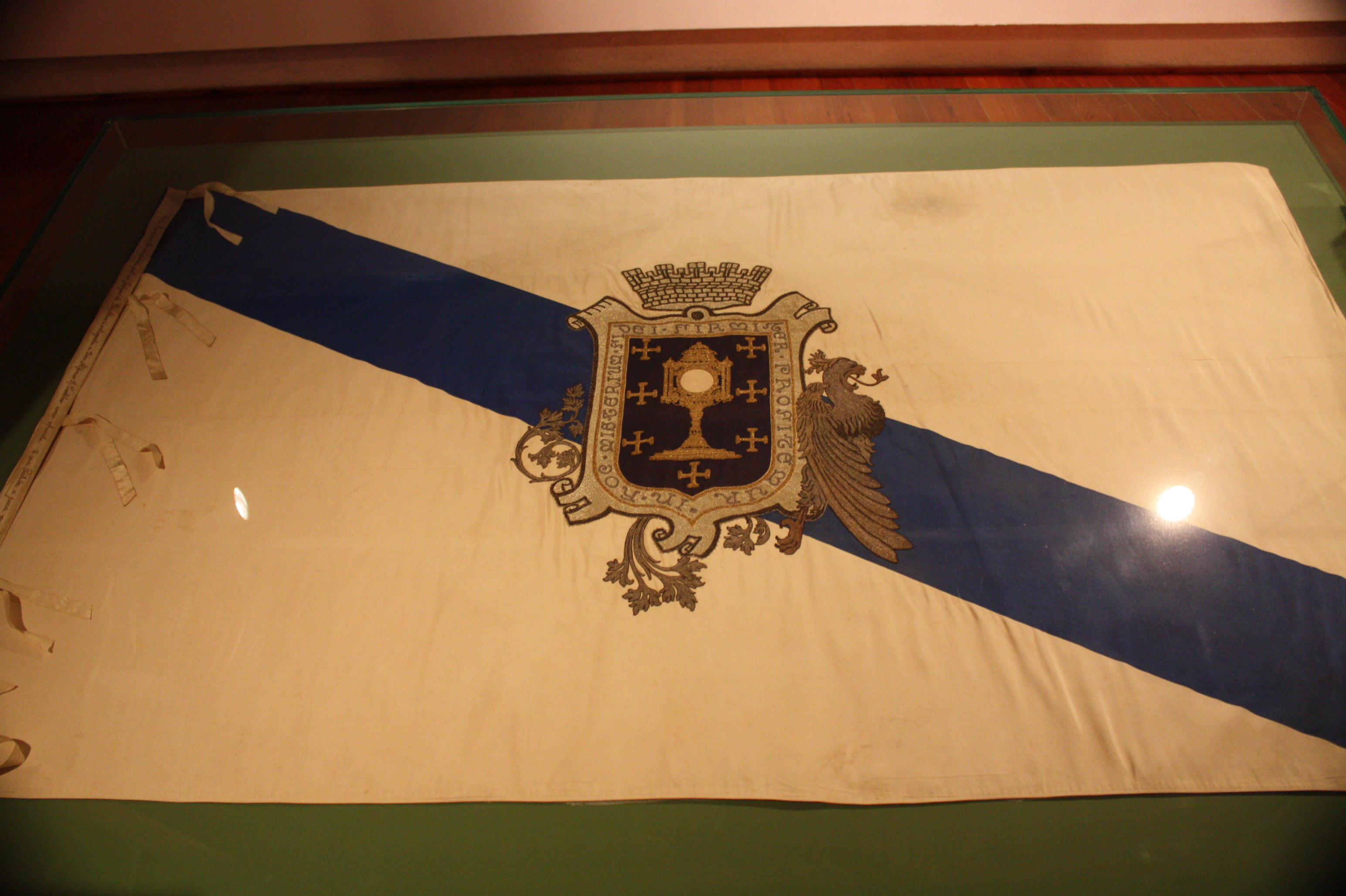 Bandeira do Consello de Galiza (Bos Aires, 1946)